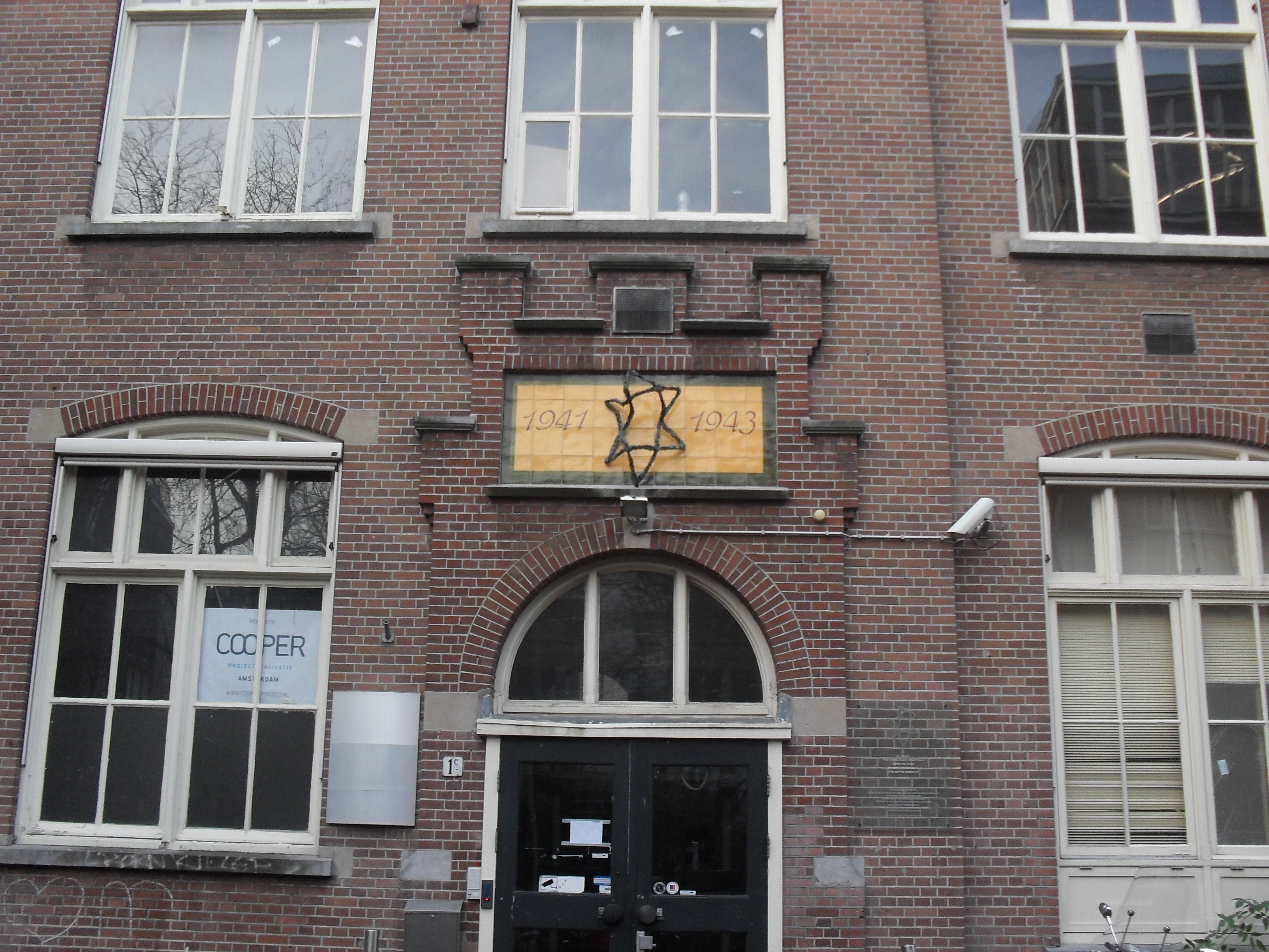 Jewish Lyceum In Amsterdam where Anne Frank and Hannah Hanneli Goslar Learned